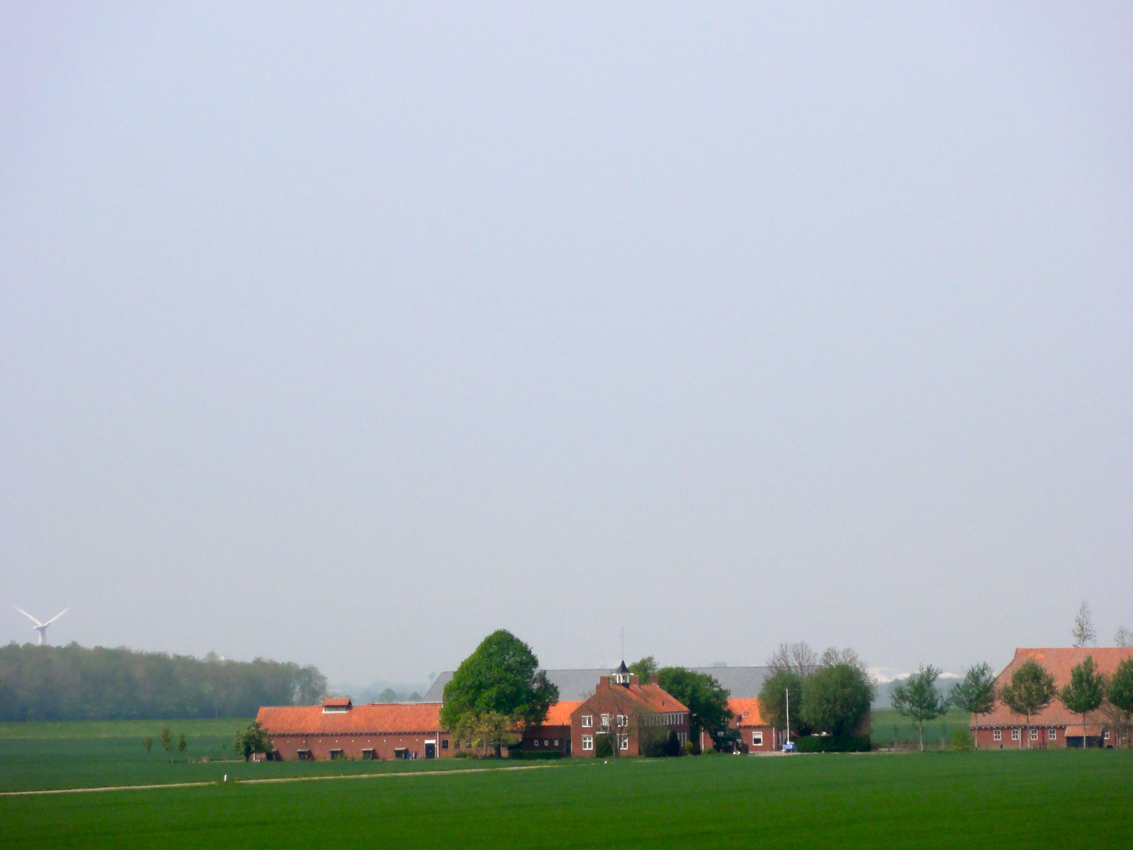 Johannes Kerkhovenpolder in de gemeente Delfzijl in Groningen